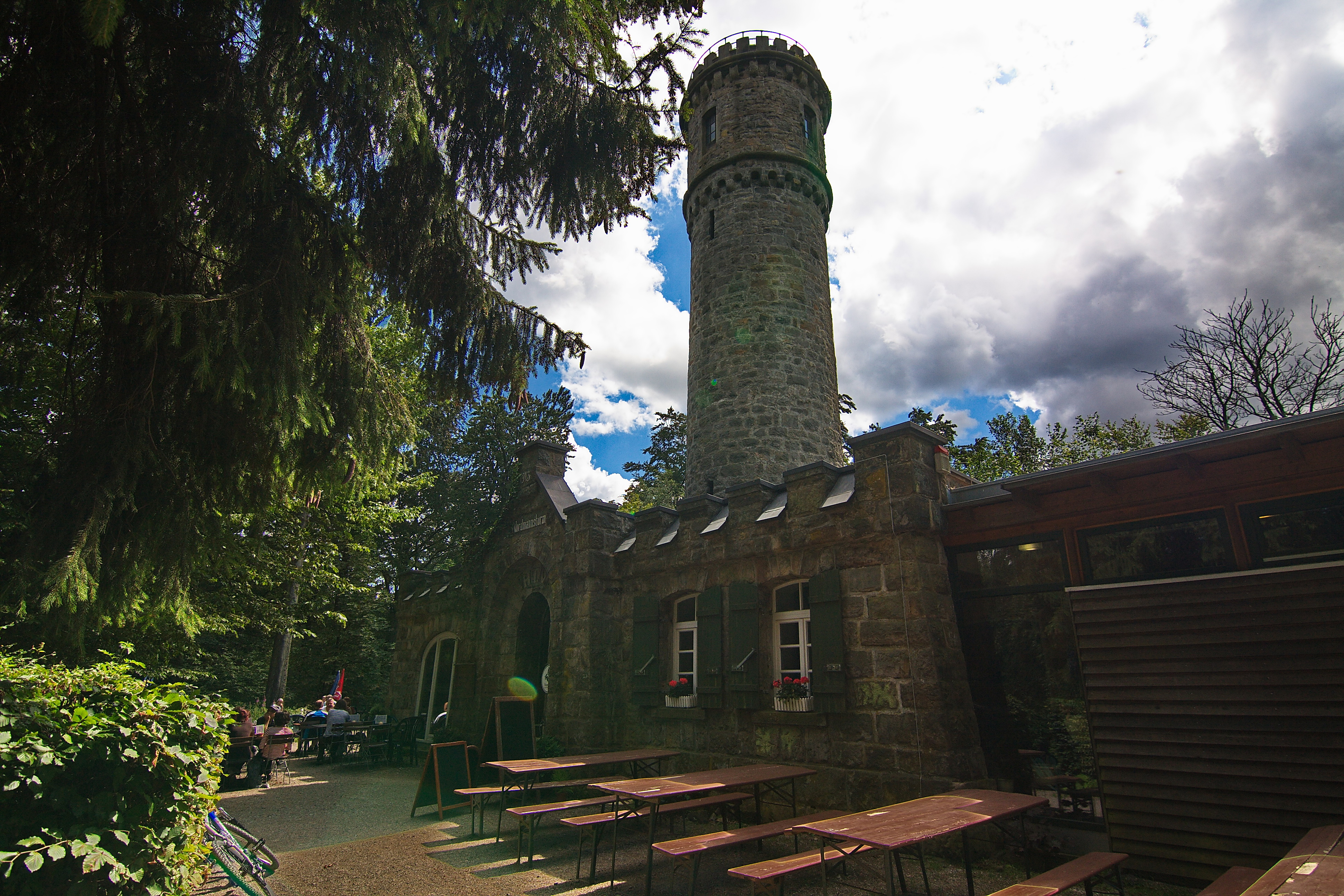 Nordmannsturm im Deister, am Nienstedter Pass, Niedersachsen, Deutschland